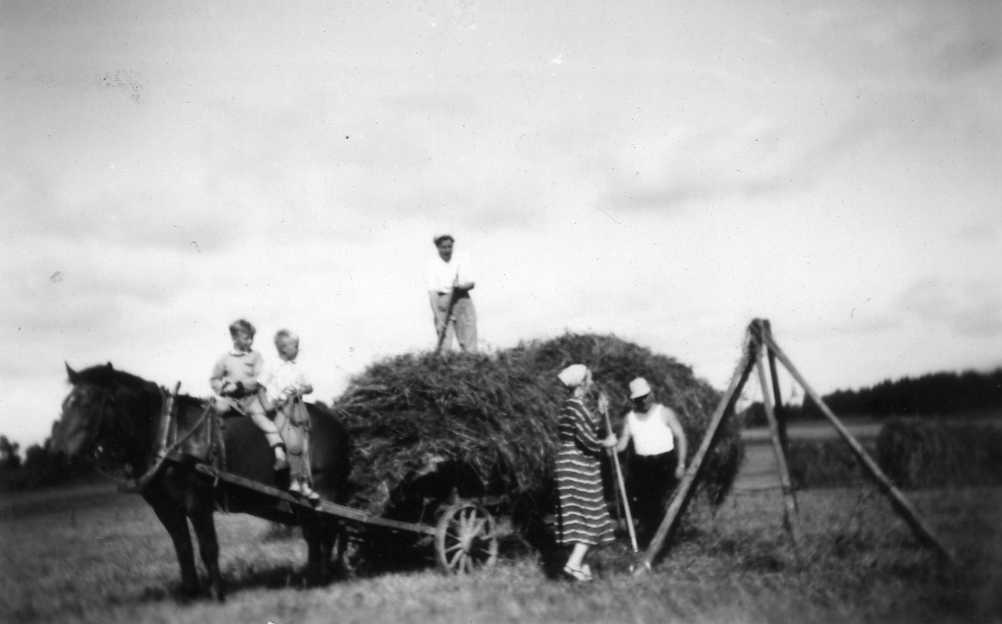 Suomenhevosen kanssa heinätöissä.